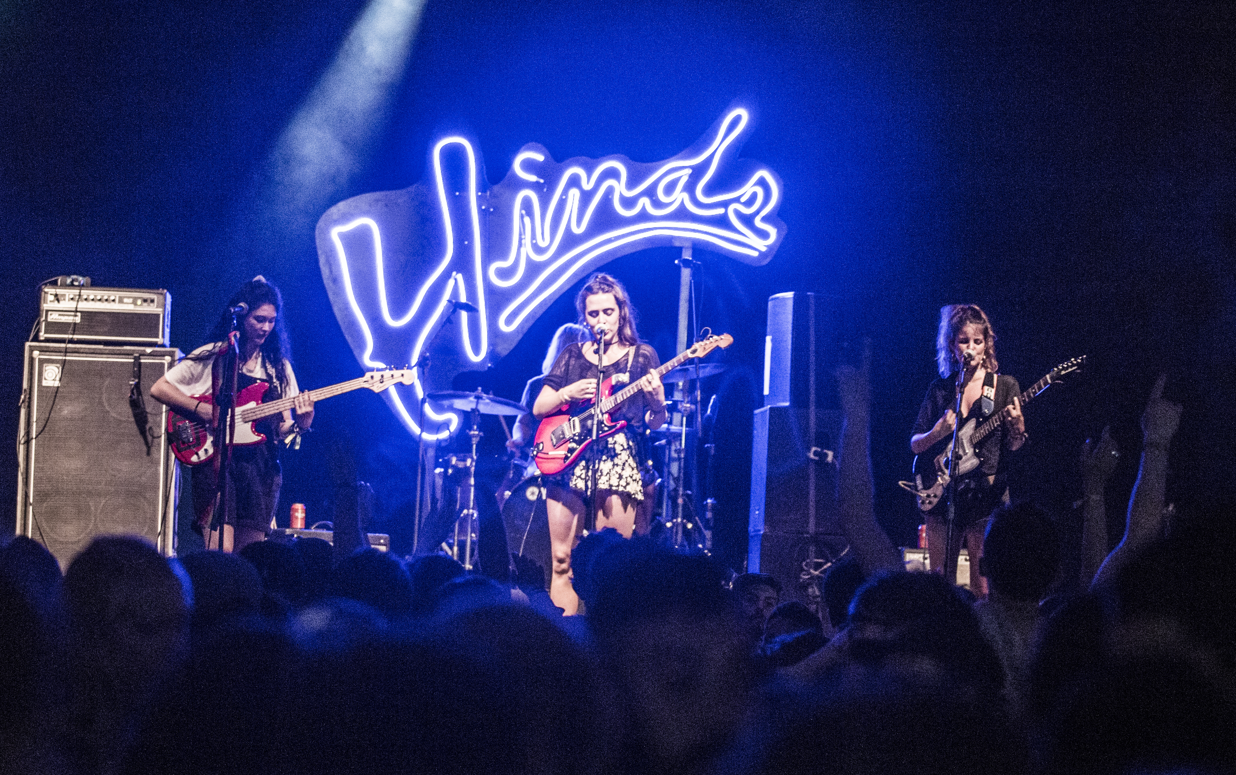 FIB 2016